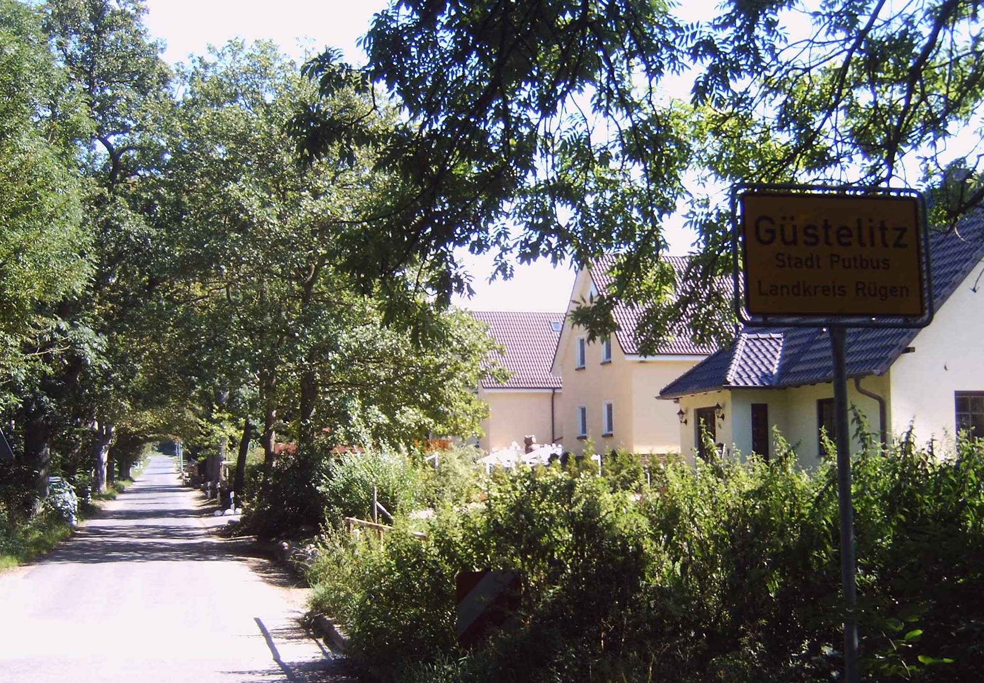 Straße durch Neu Güstelitz, Putbus, Rügen, Deutschland